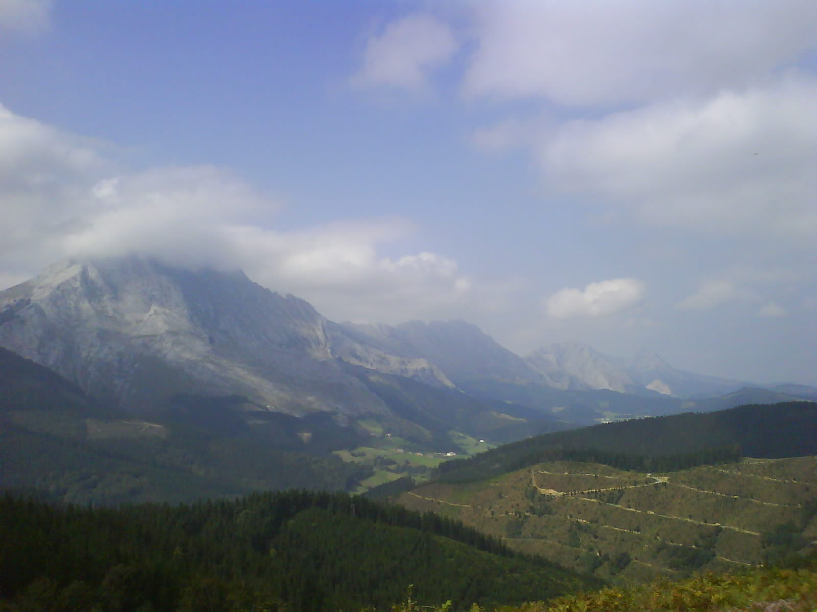 Vista de la crestería del Amboto por la cara sur, desde el Besaide. Vista el cresterío del Anboto (duranguesado)Vizcaya, País Vasco, España.